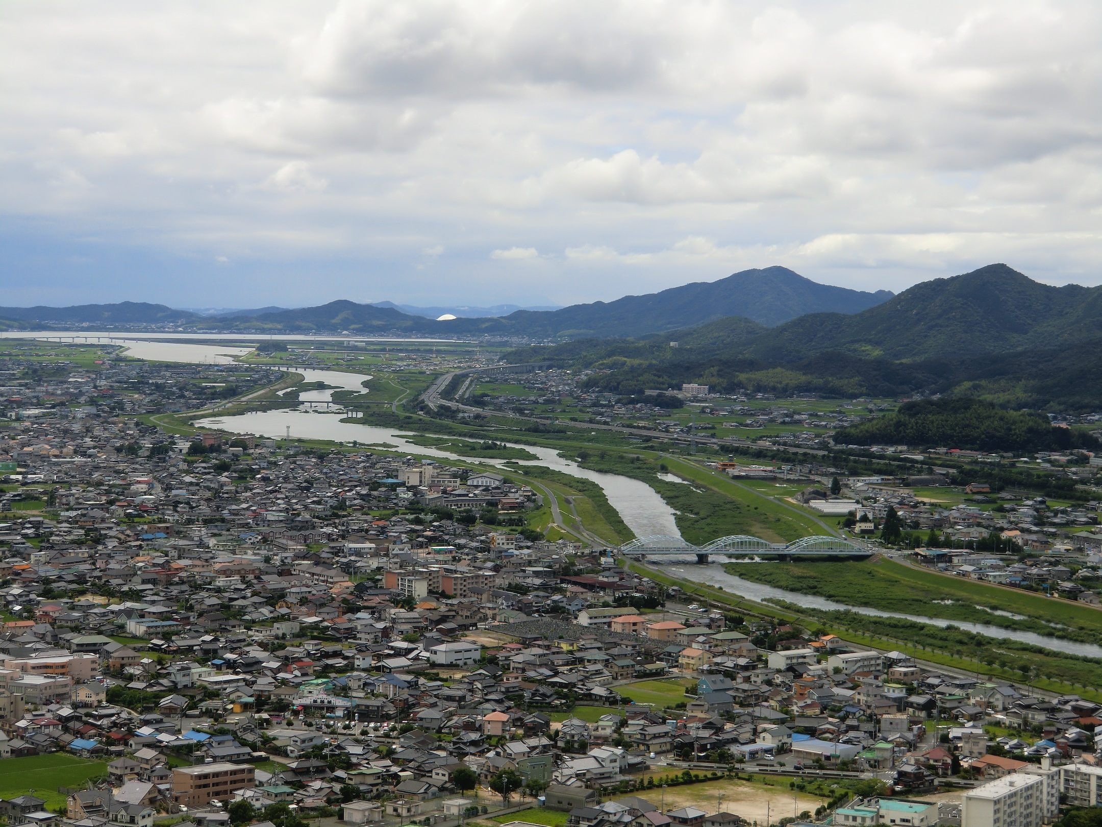 天神山山頂から見た防府市街